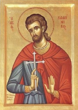 Kallinikos von Gangra